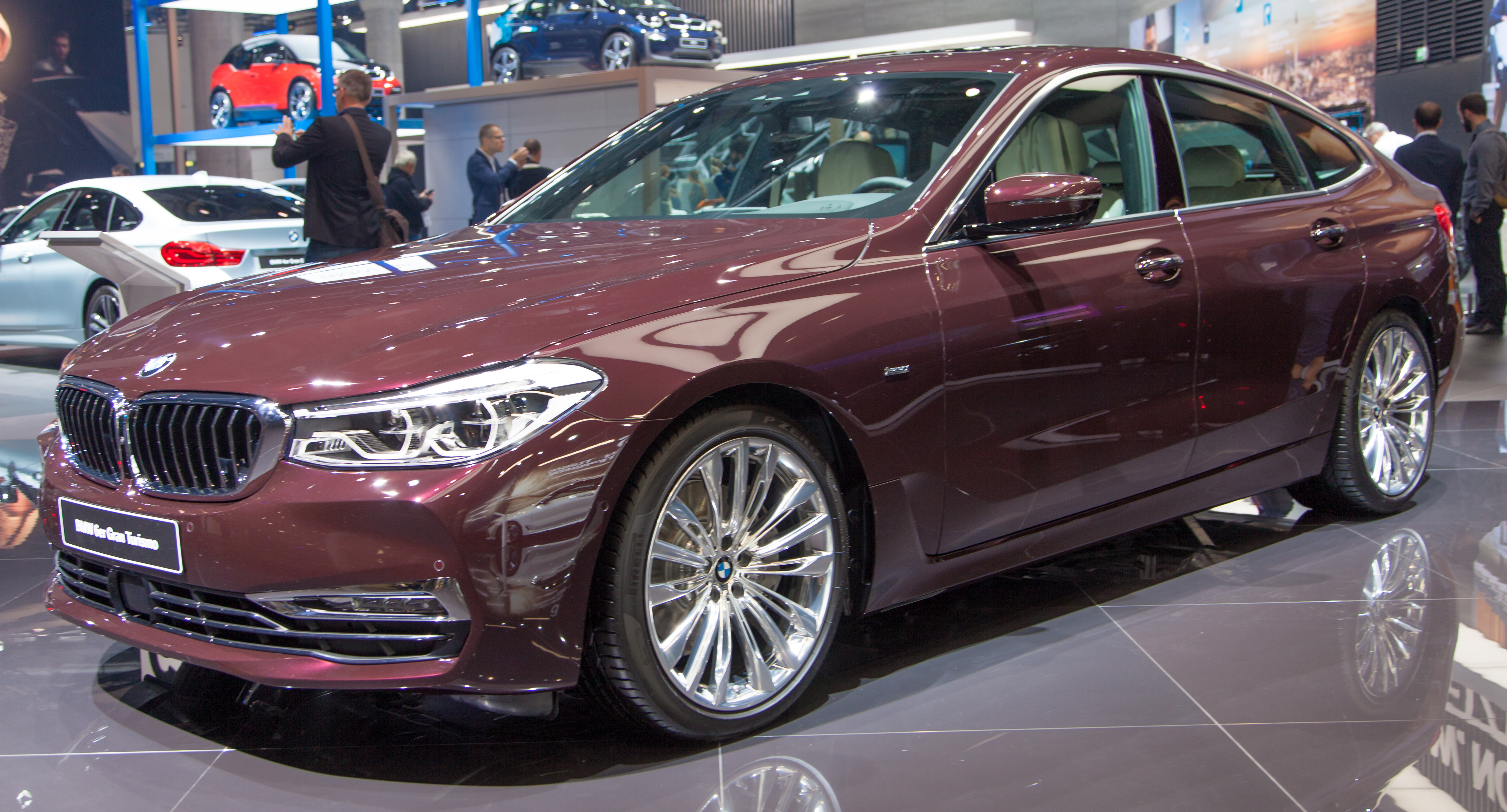 BMW 6er Gran Turismmo auf der IAA 2017